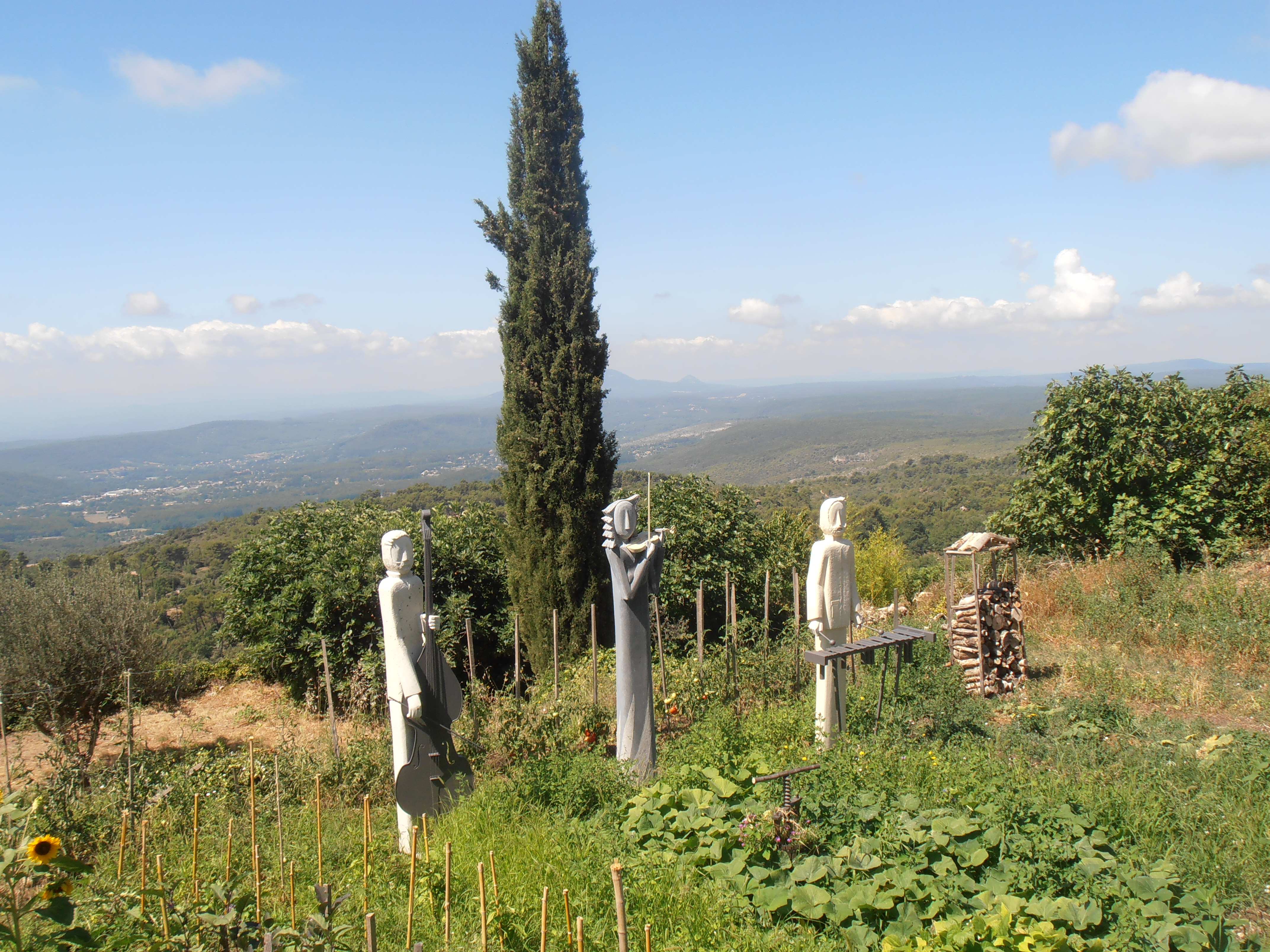 Var, Tourtour. En 2005 et 2006 l' "Atelier de Marchand de Cailloux" David Sancelot, a dévoilé à Tourtour ses premières sculptures monumentales dans le jardin potager sous la place Annabelle et Bernard Buffet : des géants "monolithes" ou "duolithes" constituant une véritable poésie minérale. La place est utilisée pour les jeux de boules, le marché, comme belvédère, et pour des animations diverses